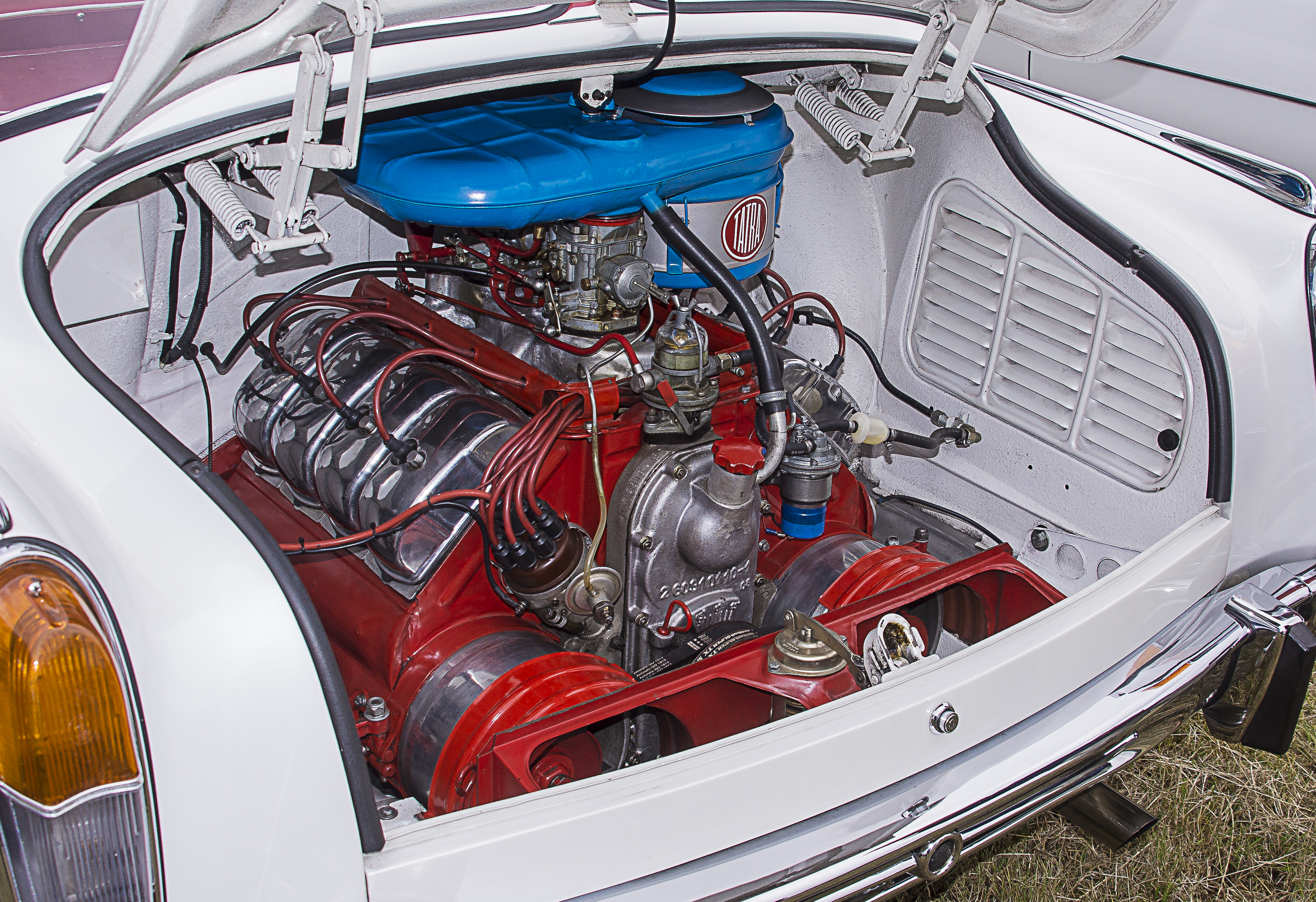 Luftgekühlter V8 Motor des Tatra 603-2 Bj.1969 Hubraum: 2472 cm³ Leistung: 77 kW (105 PS) bei 4800 U/min